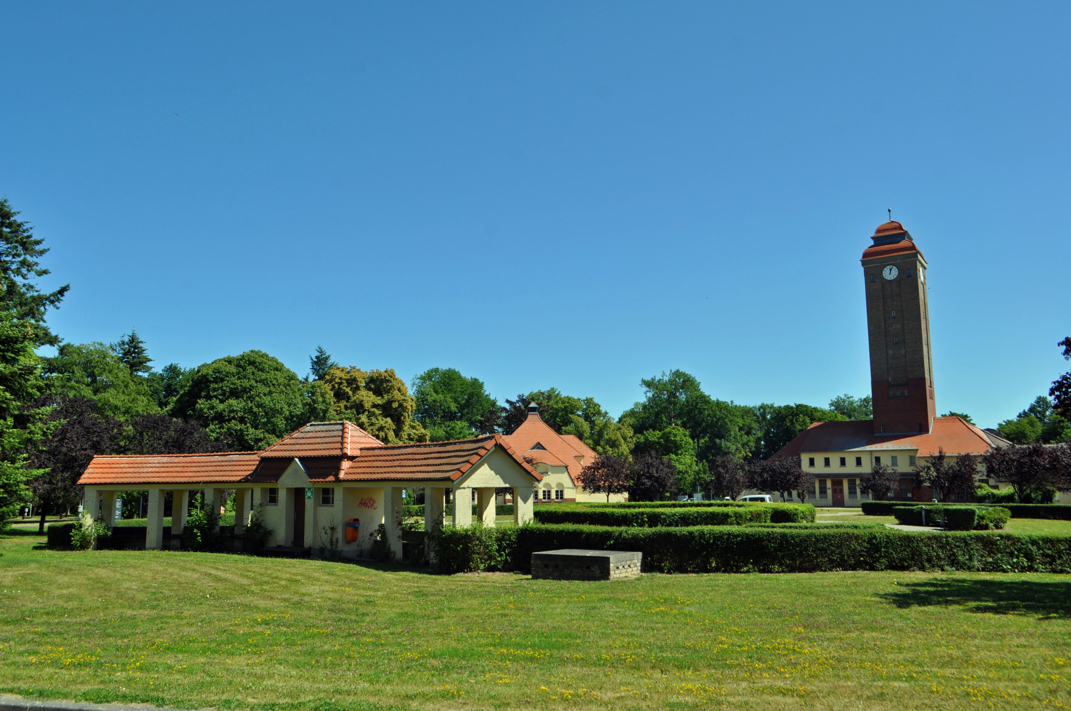 Auf dem Gelände des Krankenhauses "West" (HELIOS Hanseklinikum, West, Rostocker Chaussee 70, in Stralsund). Rondell